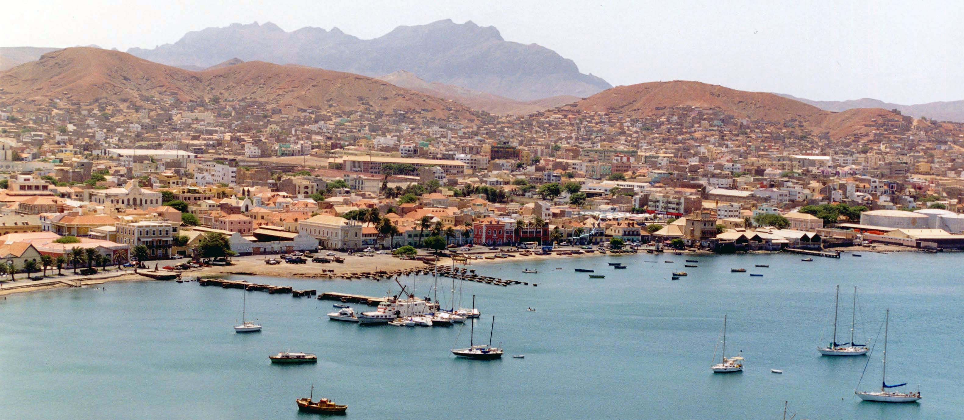 Blick auf Mindelo, Kap Verde, im August 2000.